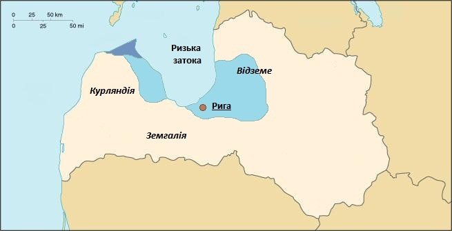 Території проживання лівів у XII столітті (блакитний колір) і в наш час (синій колір) на мапі сучасної Латвії.